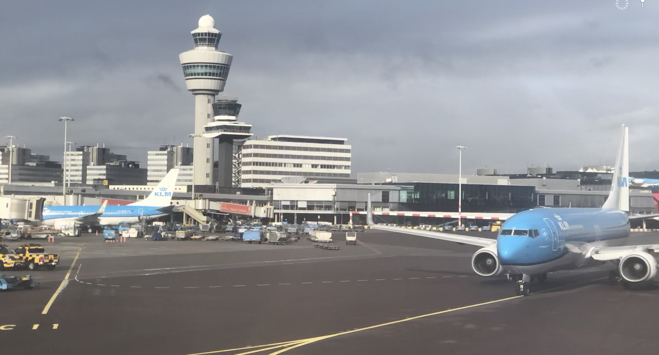 Аэропорт Схипол